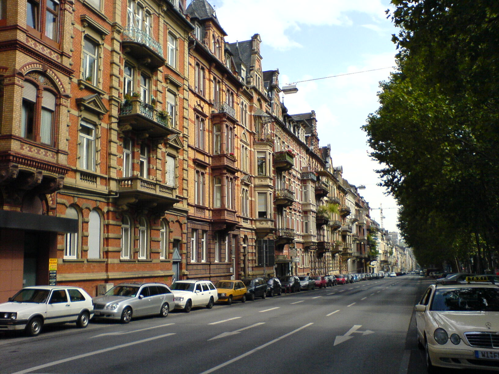 Das Bild zeigt die nördliche Seite der Rheinstraße in Wiesbaden. Blick Richtung Osten, oberer Bereich: historistische Fassaden, entstanden um 1900.